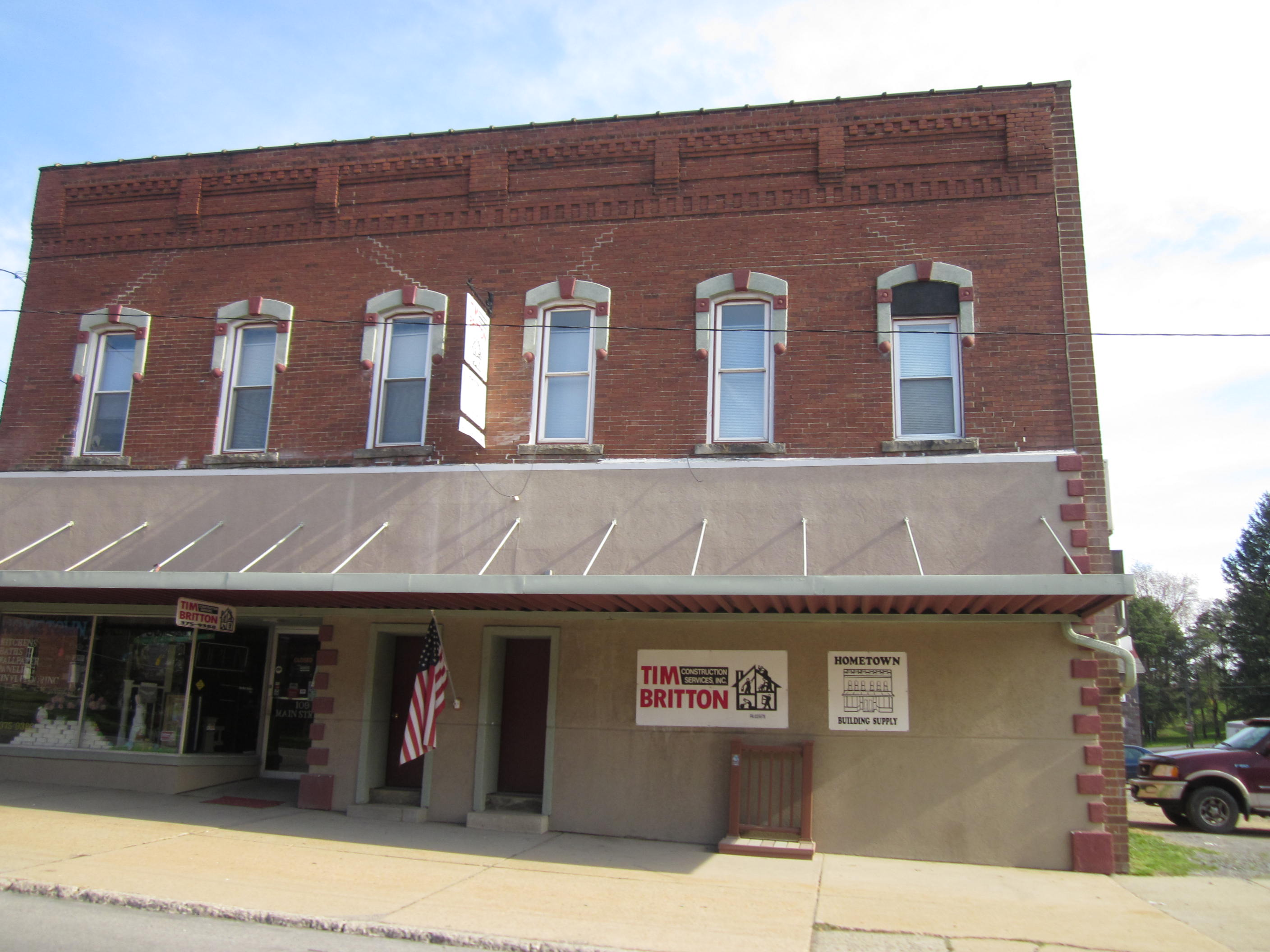 Falls Creek, Pennsylvania